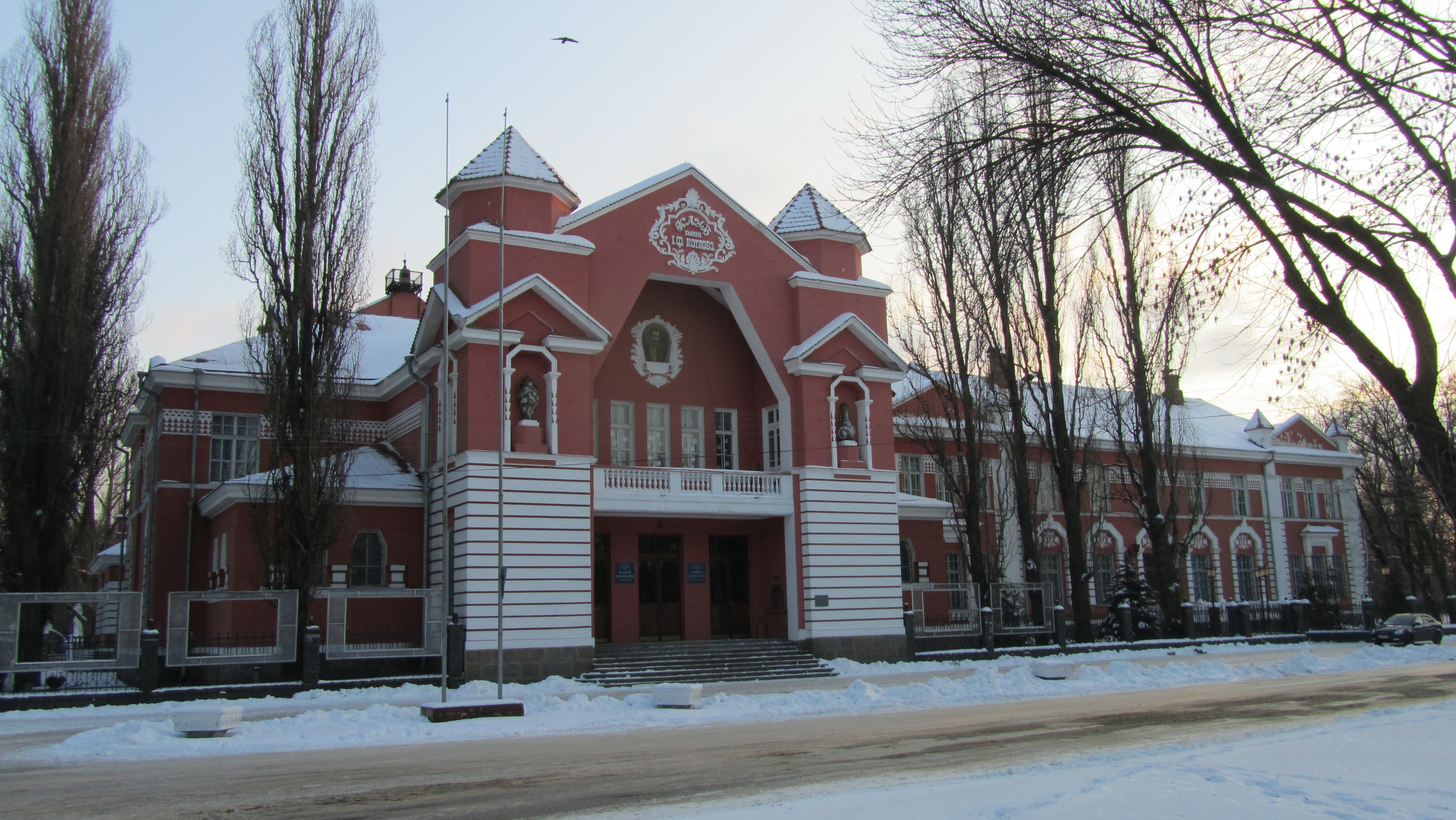 Клуб імені І. Ф. Котлова, Кременчук, Вул. І. Приходька, 100